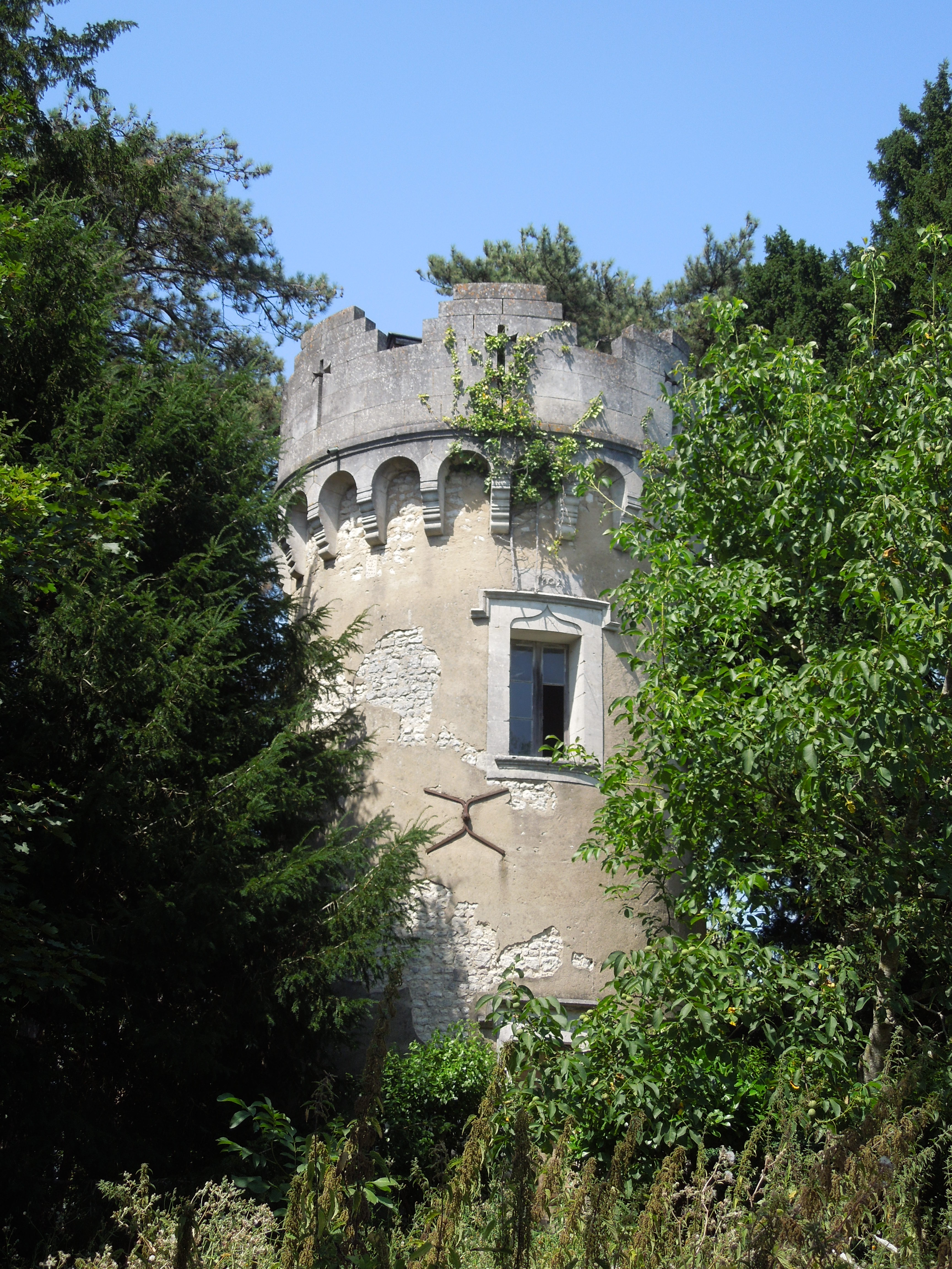 Turm der während der frz. Revolution zerstörten Burg in Archiac